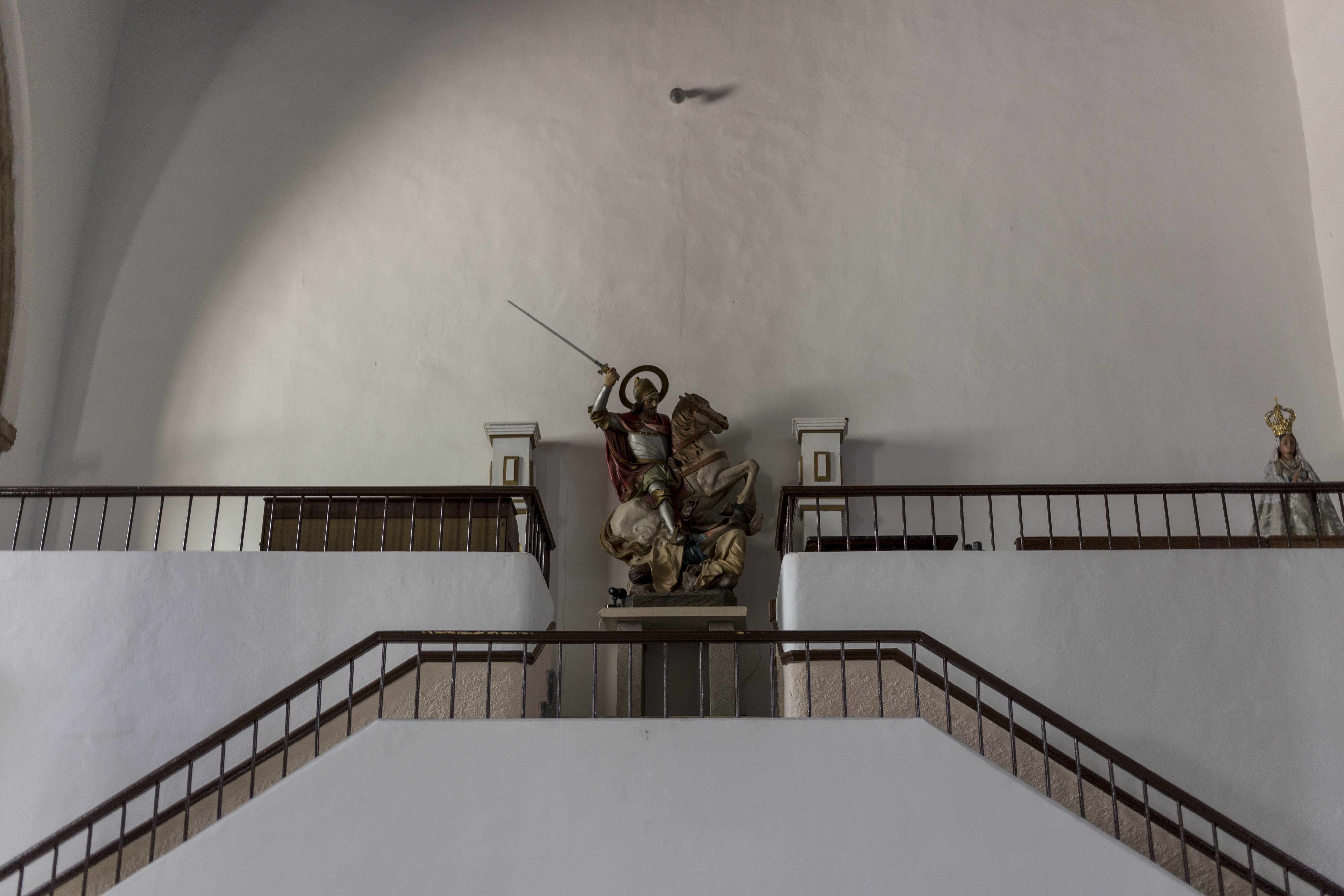 Espinoso del Rey